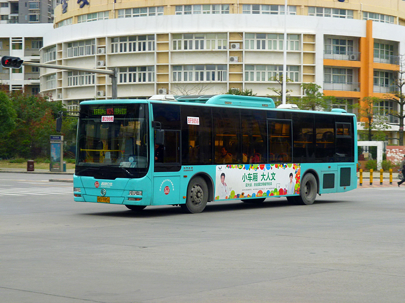 中文（中国大陆）: 深圳公交M375路金旅XML6115J33C